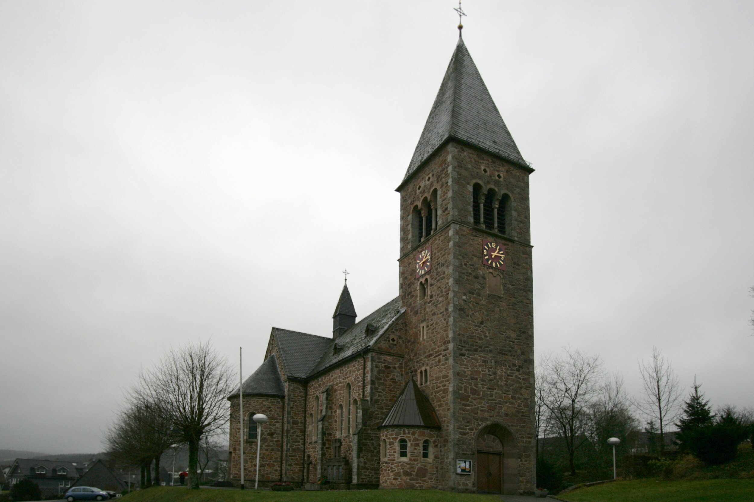 Kirche Kirchhundem-Albaum